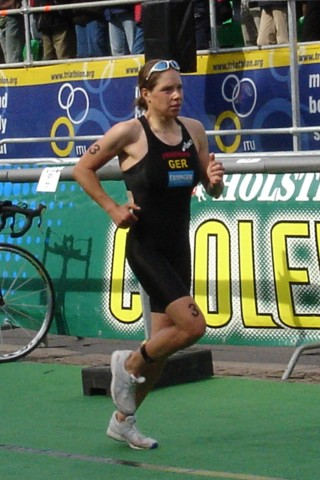 Joelle Franzmann beim Triathlon 2005 in Hamburg, selbst fotografiert.